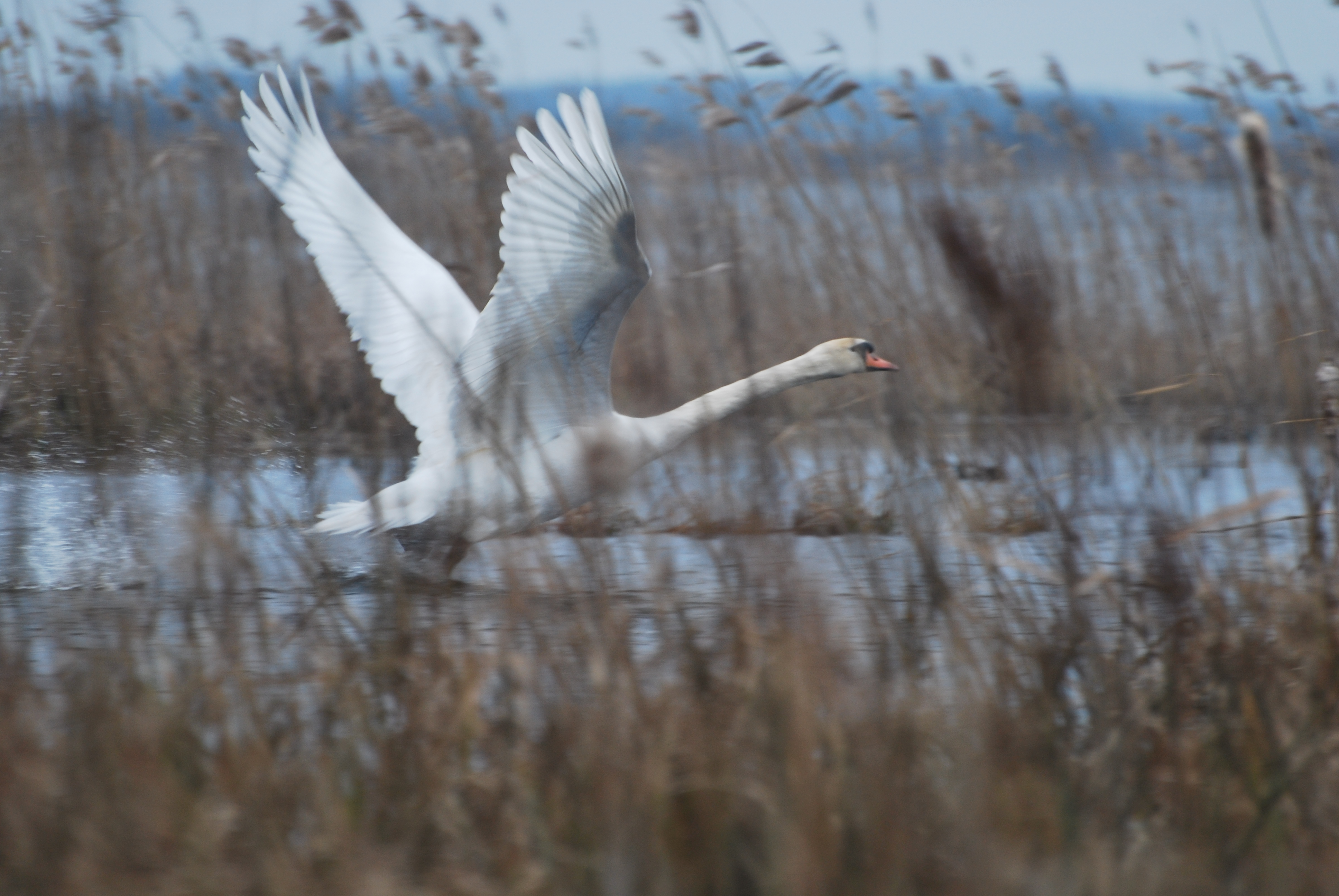 Урочище «Вовча гора», Сарненський район